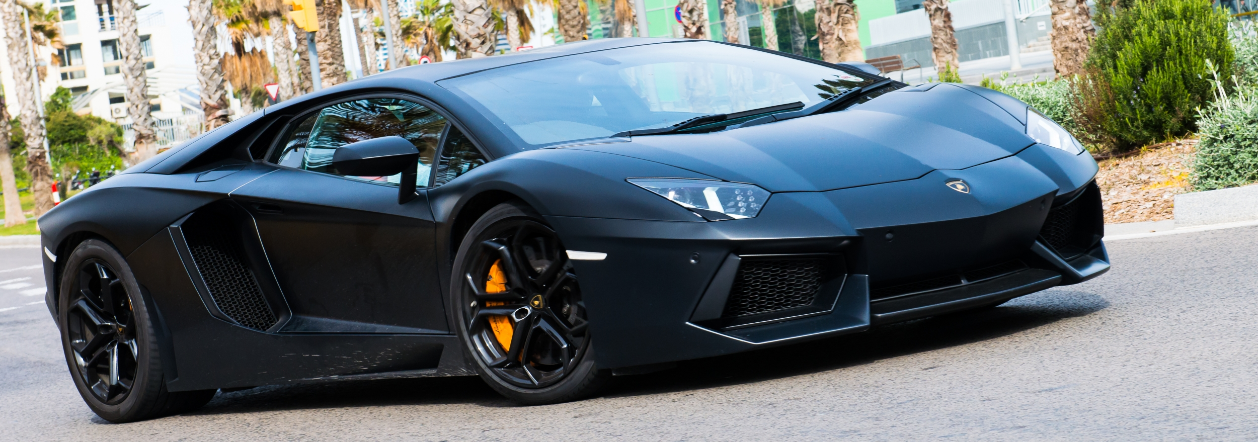 Automobil